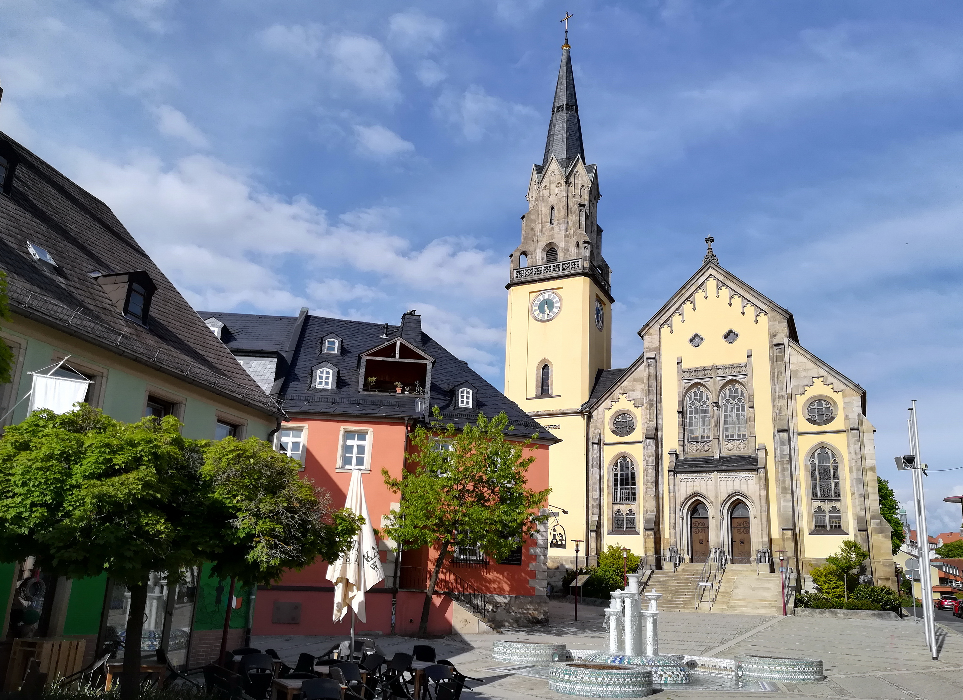 Die Stadtkirche St. Andreas wurde nach dem verheerenden Selber Brand 1856 an dem Standort der alten Stadtkirche, nicht jedoch auf deren Fundament errichtet.